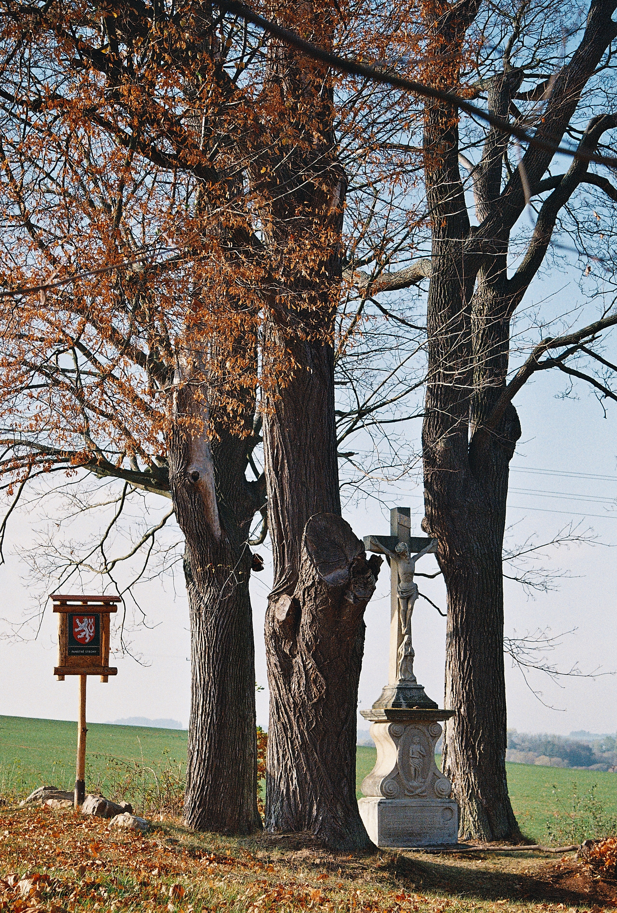 Památné lípy a javor u božích muk u silnice mezi Zbraslaví a Štědrou.